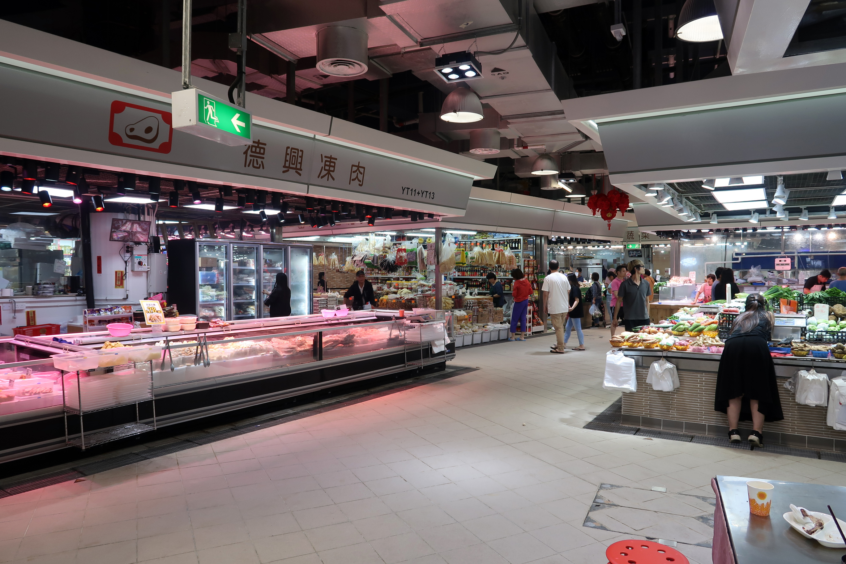 Ying Tung Market